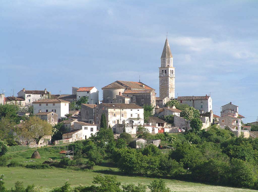 Stari dio Višnjana, gledano sa sjevera, svibanj 2002. godine, Istra.